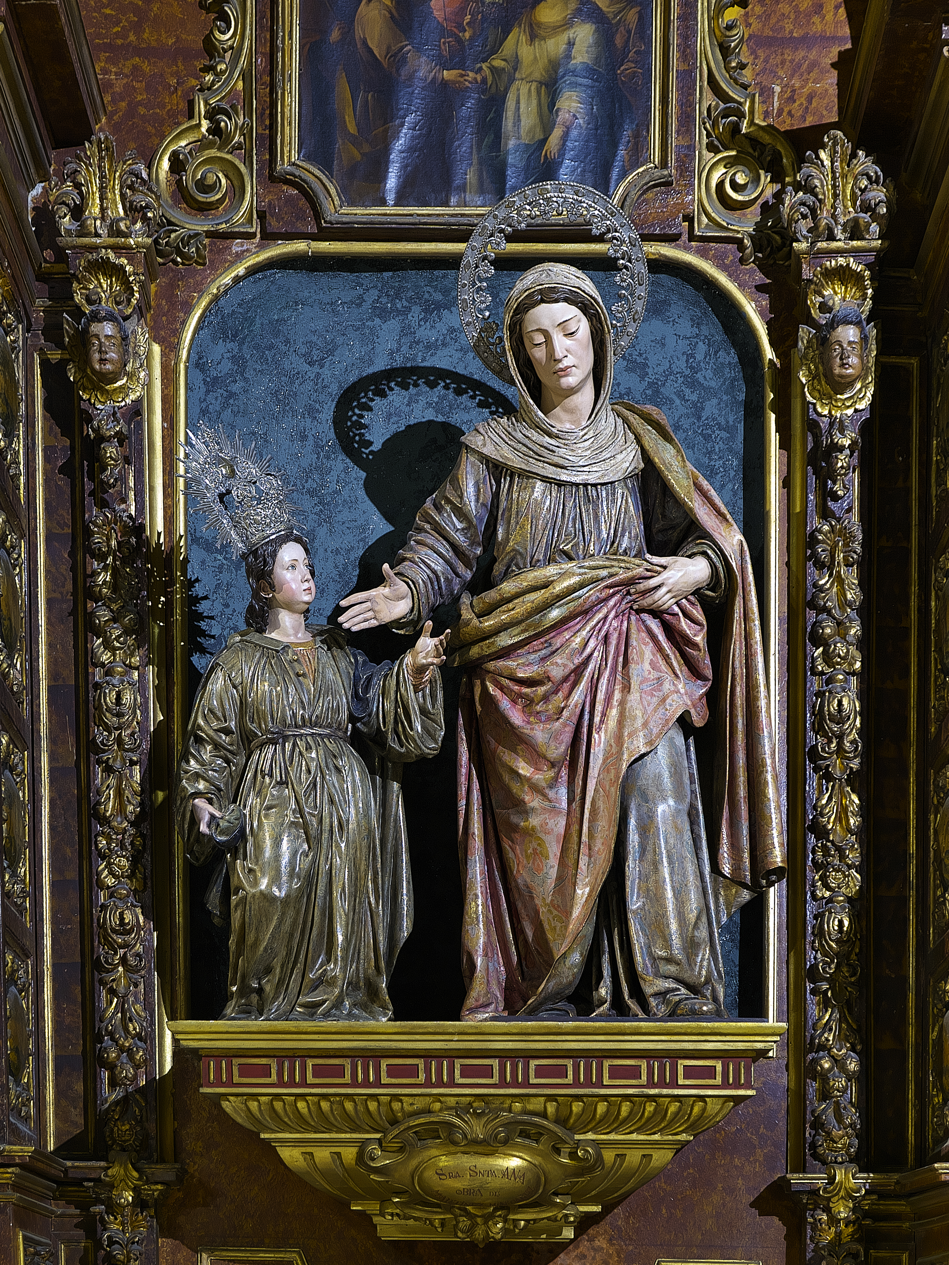 Iglesia del Buen Suceso (Sevilla). Juan Martínez Montañés talla el conjunto de la Presentación de María al templo (1632) para los Carmelitas de la Iglesia de San Alberto (Sevilla).